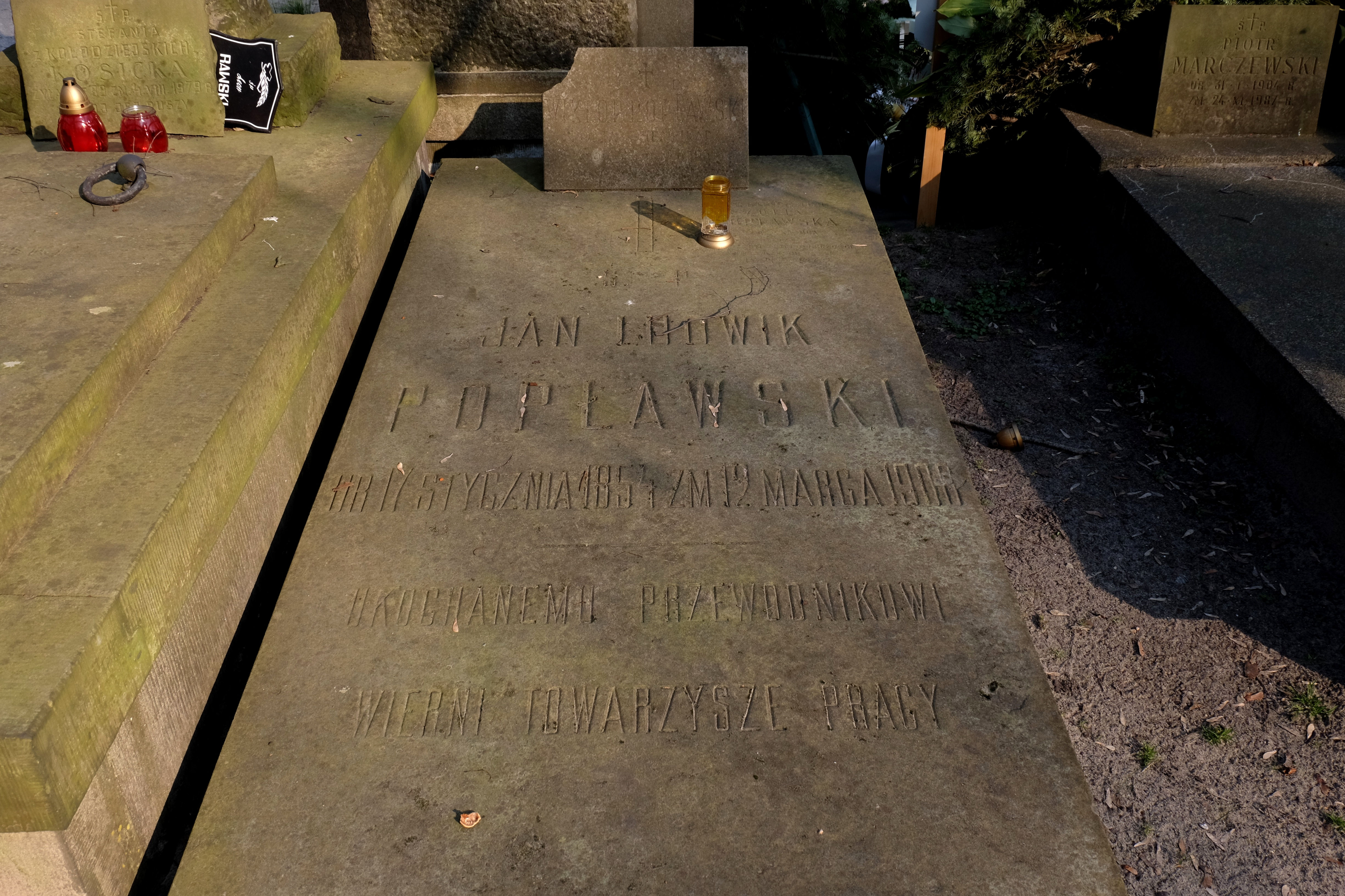 Grób publicysty i działacza politycznego Jana Ludwika Popławskiego na Cmentarzu Powązkowskim w Warszawie